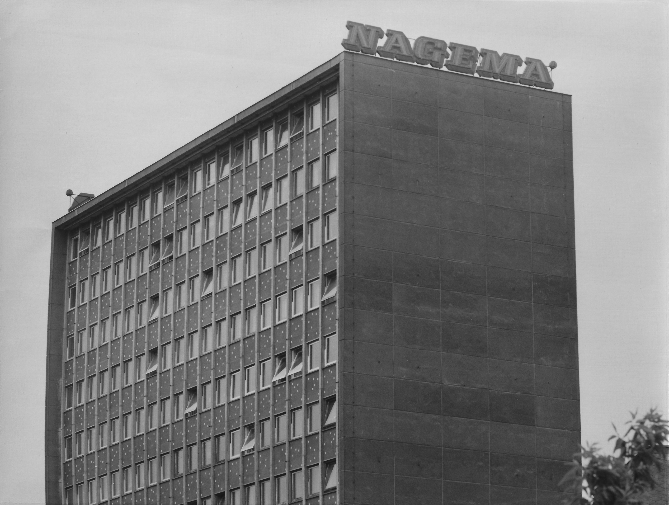 Nagema, einer der Vorgänger von Theegarten-Pactec hatte seine Zentrale am heutigen Firmensitz.